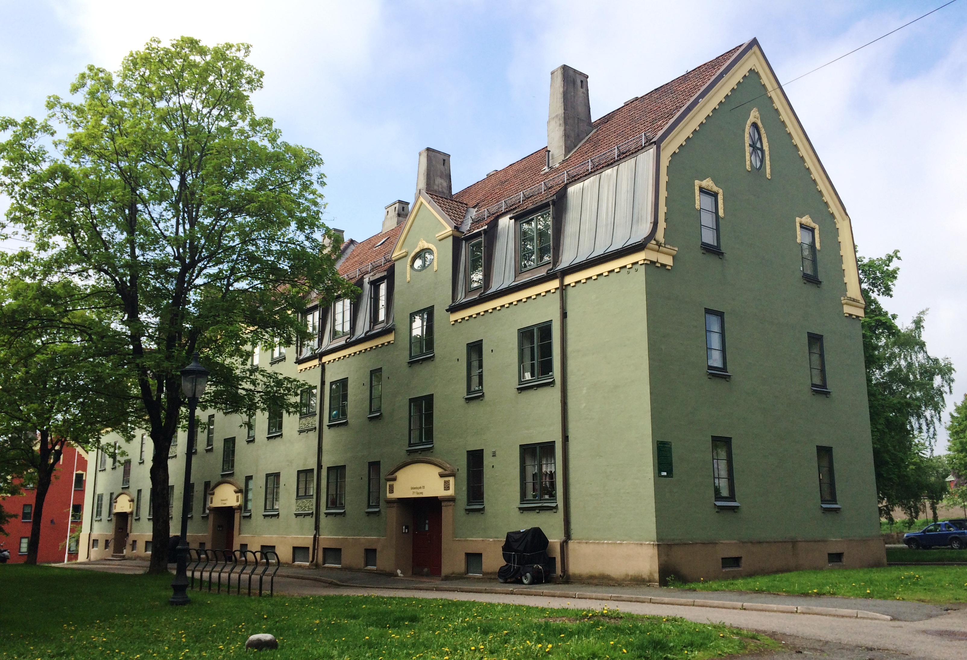 Rivertz-komplekset er et strøk med tidlig 1900-talls jugend bygårder på vestre Sagene i Oslo.